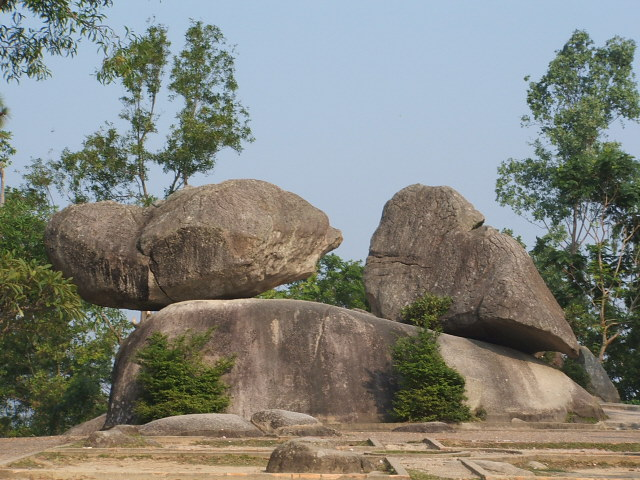 Hòn Trống mái.